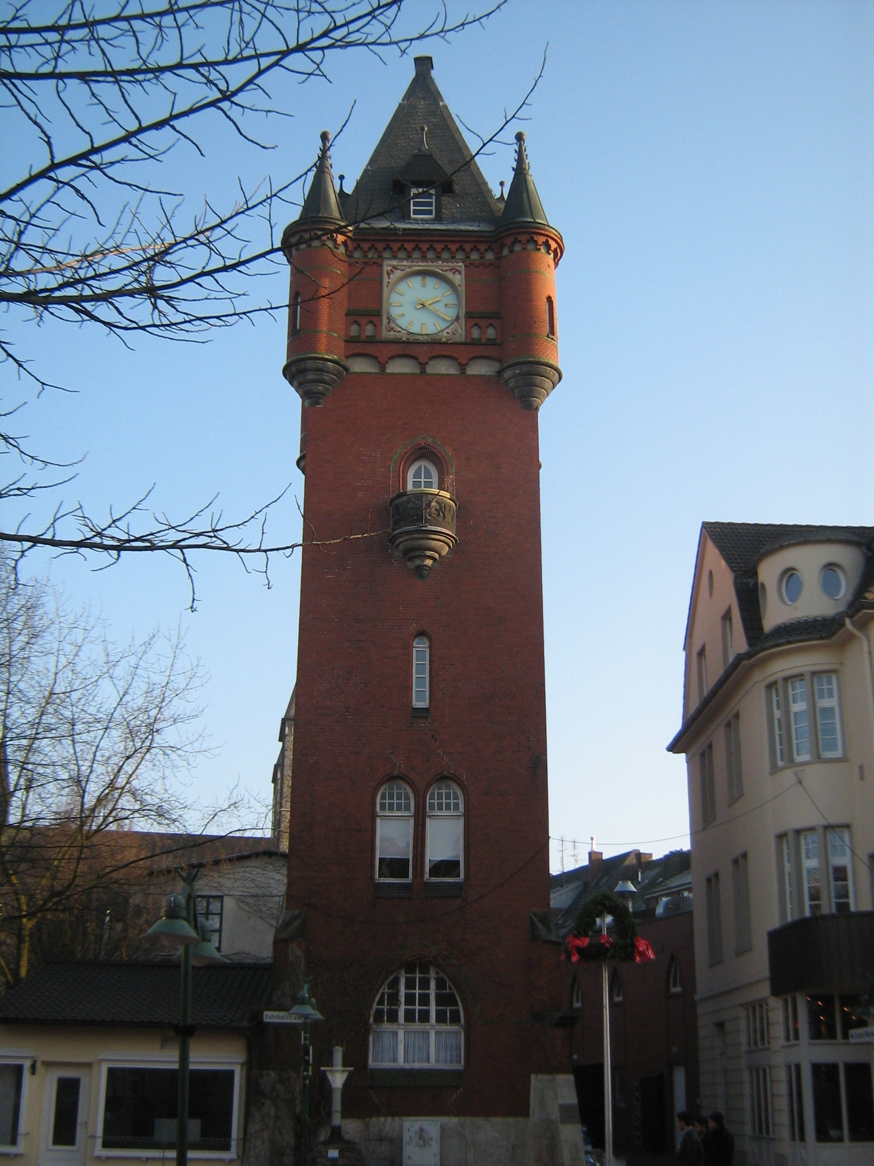 Alter Rathausturm in Gronau/Westf.